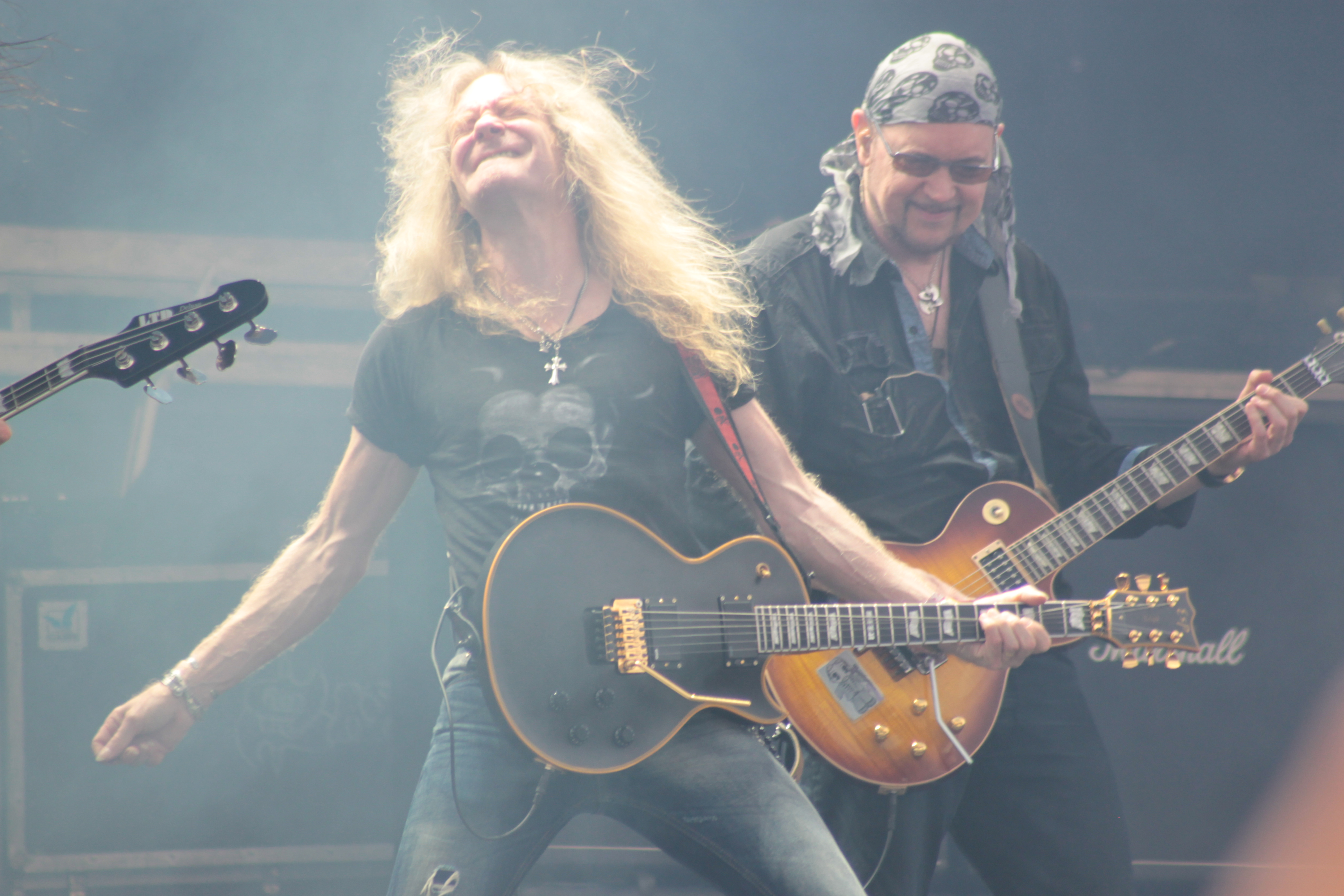 Douglas Scarratt et Paul 'Blute/Quinnine' Quinn, Saxon, Hellfest 2013, Fr-44-Clisson.